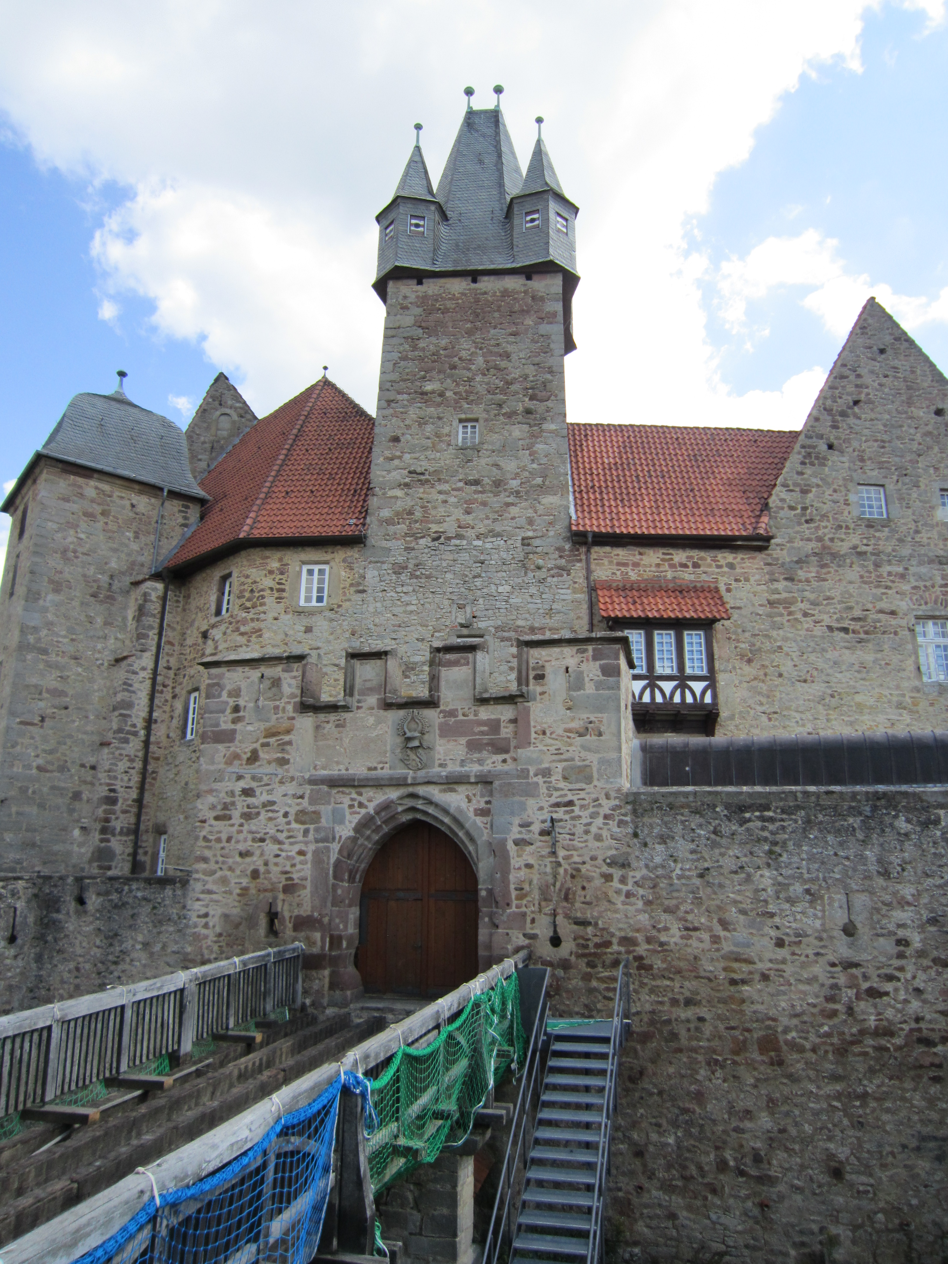 Kasteel Spangenberg